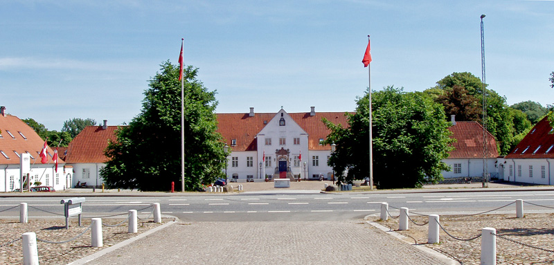 'Dansk: Bygholm, ', er en herregård i Horsens, Nim Herred, Jylland, Danmark. Gården set fra parken. Image taken by me user:Nico-DK / Nils Jepsen